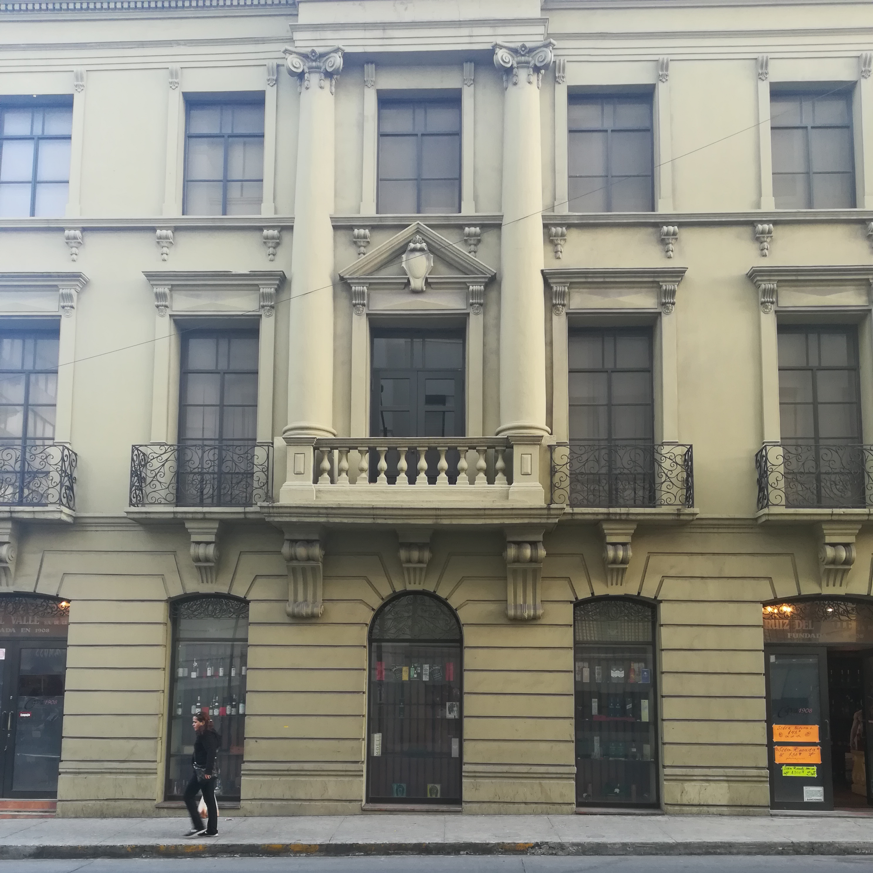 Edifcion en el Centro Historico